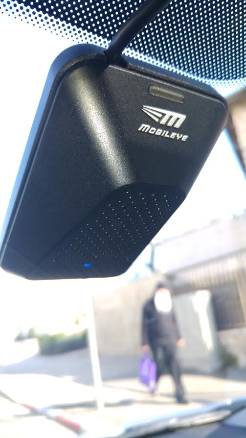 מצלמת חלון של מובילאיי